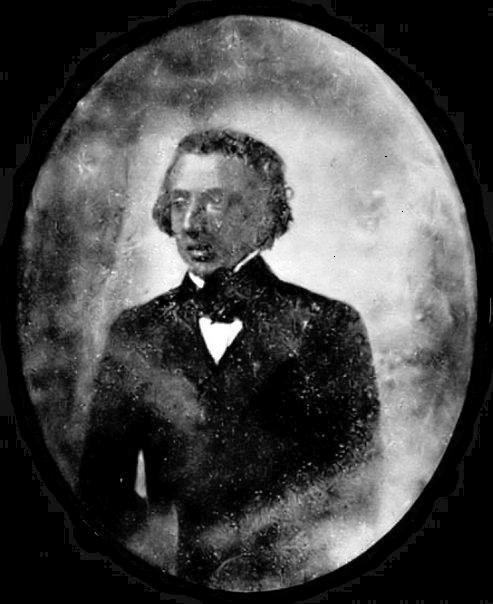 Frédéric Chopin 1846 or 1847 daguerreotype